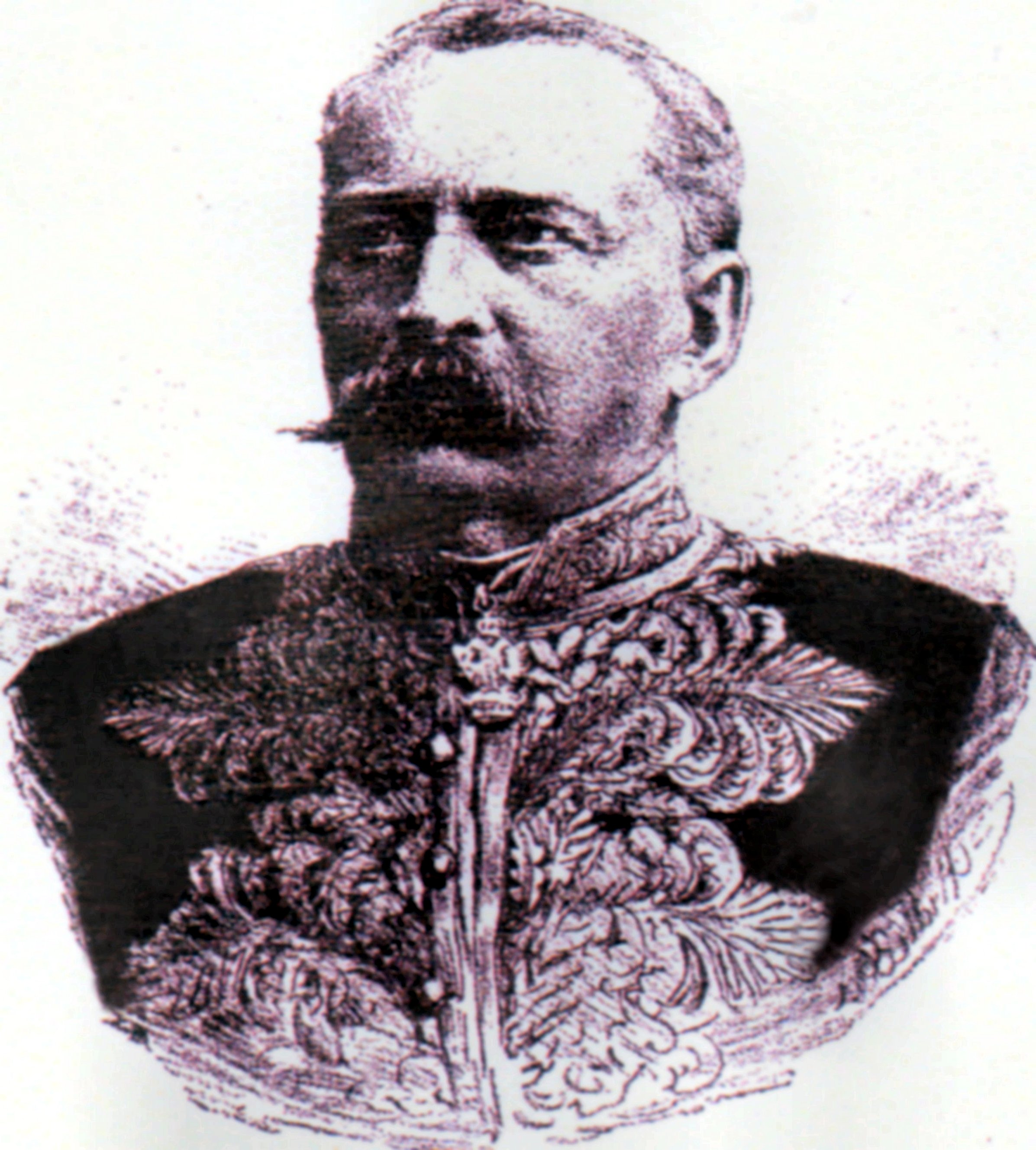 Landeshauptmann, Mitglied des Herrenhauses und Wirklicher Geheimer Rat, Freiherr Alexander Wassilko von Serecki im Jahr 1890